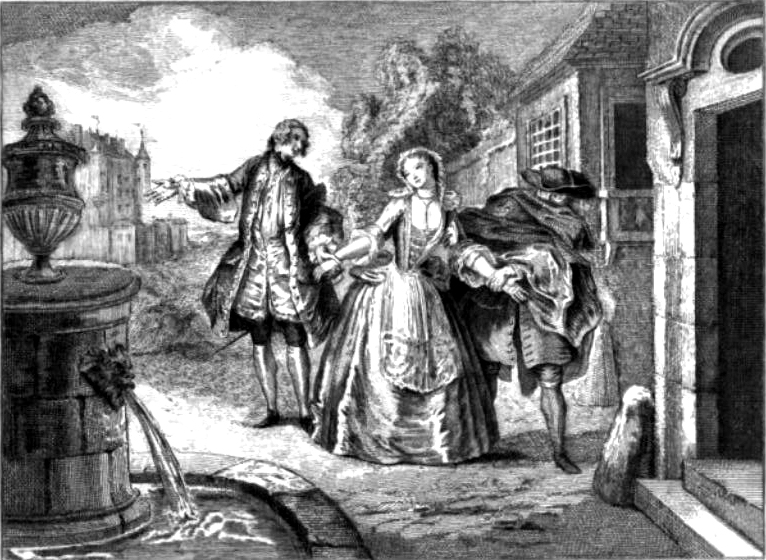 Front page of L'École des femmes (1662) by Molière (1622-1673)